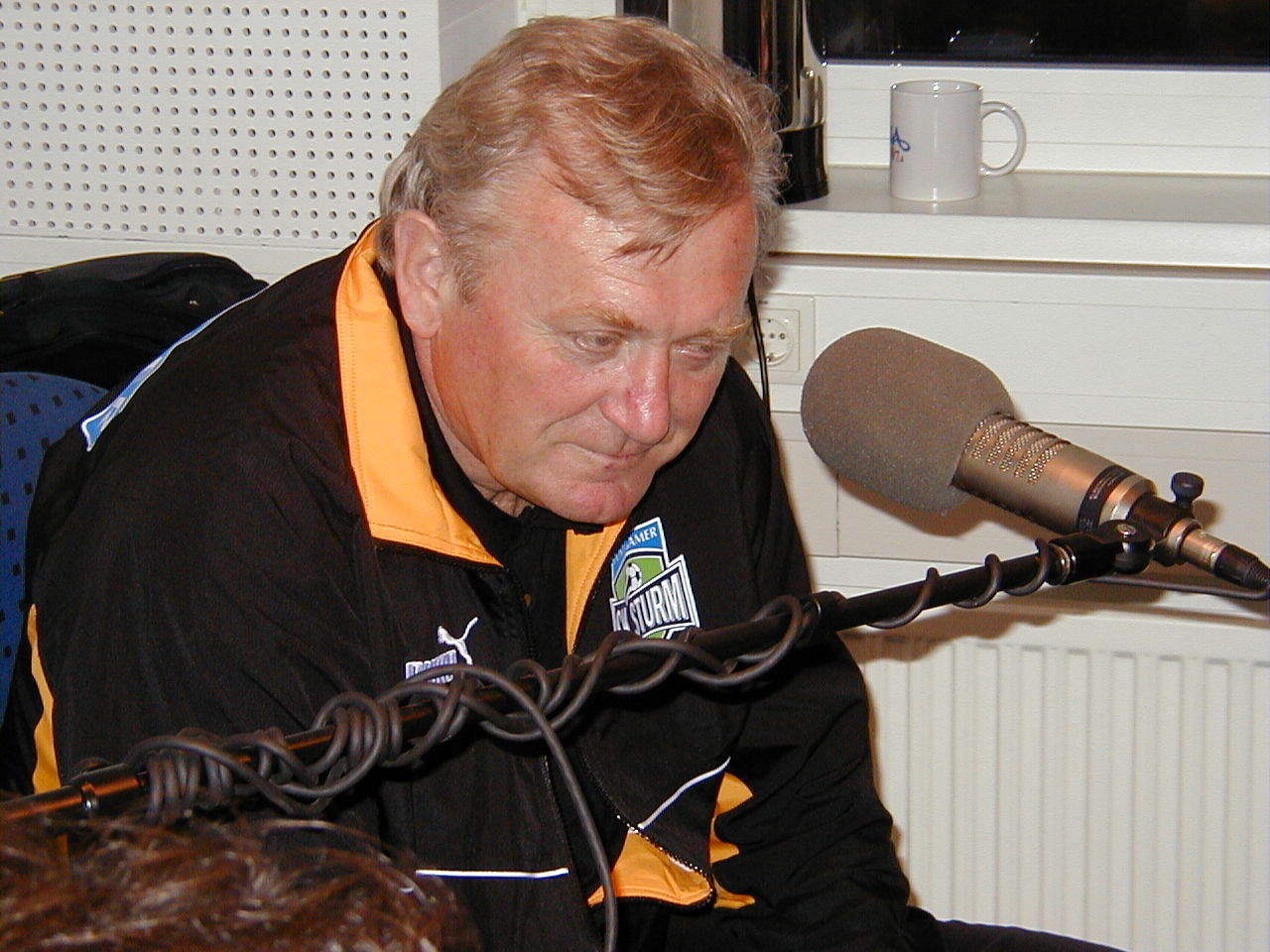 Ivica Osim - SK Sturm (1999) on local radio program